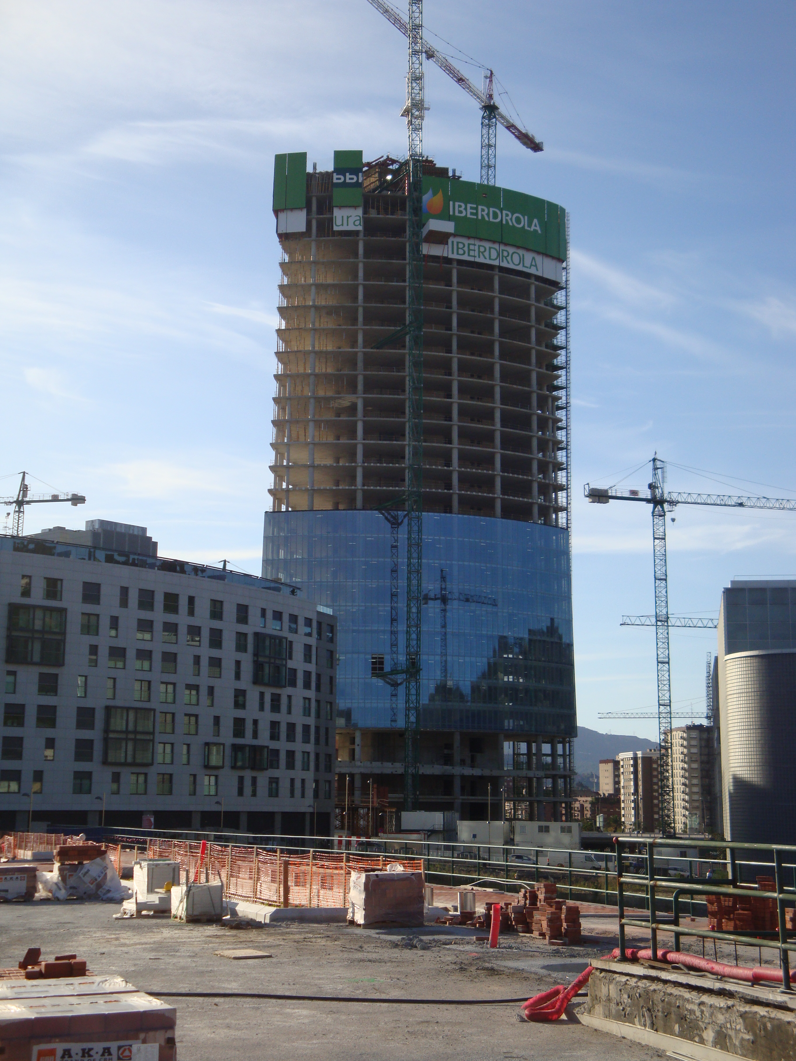 Torre Iberdrola en el estado que se encuentra en octubre de 2009 (Bilbao)